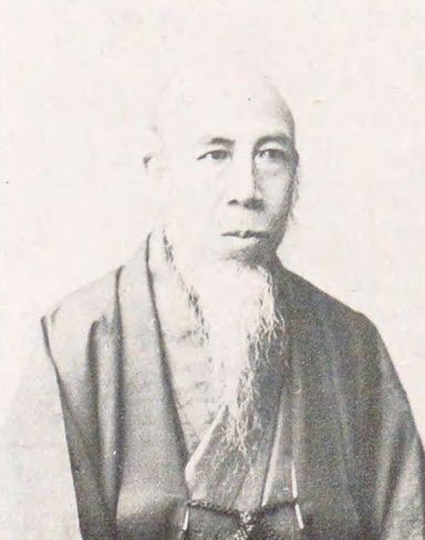 飯田武郷（1828-1900）